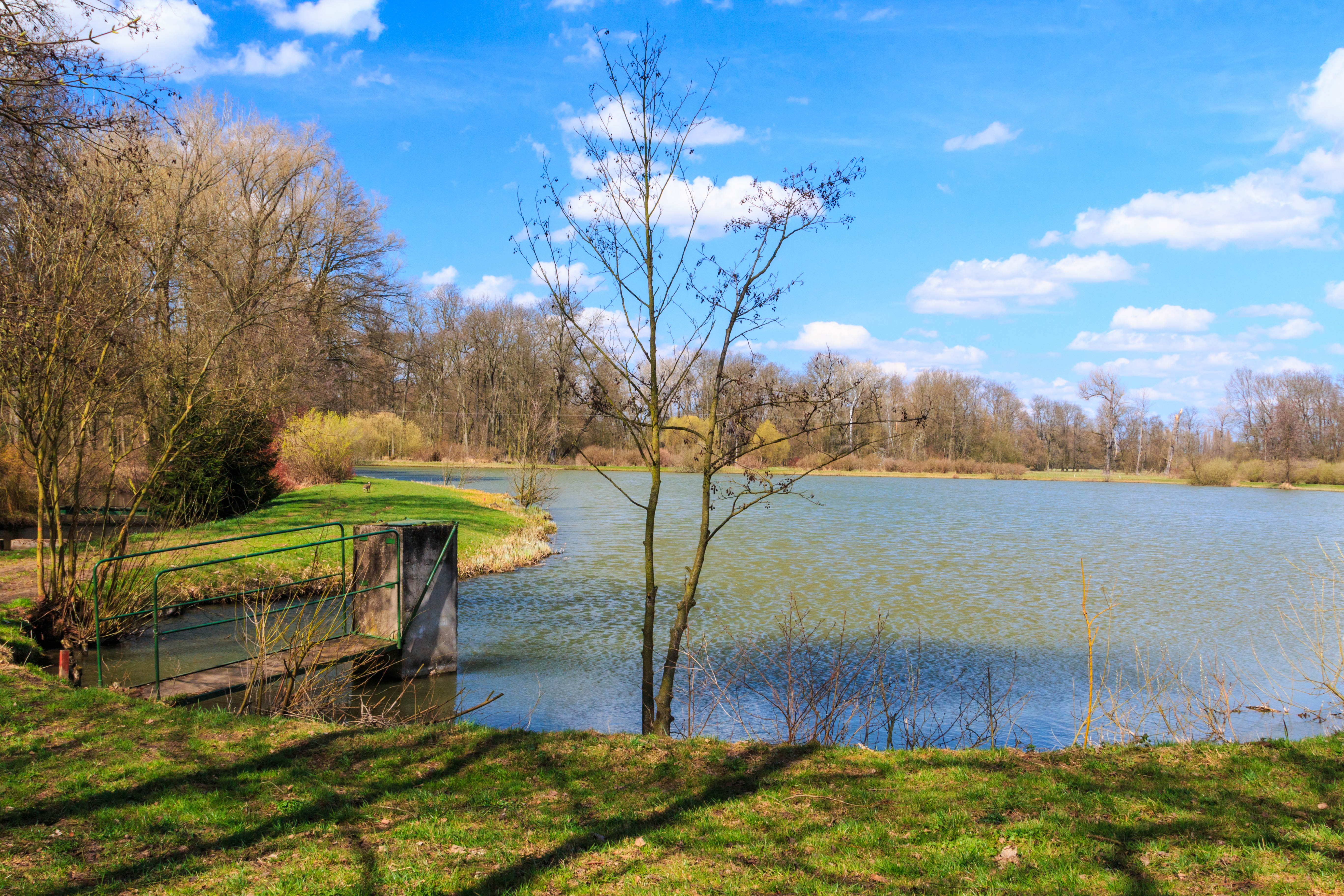 Rybník Skřivan u obce Skřivany Project: Vodstvo.